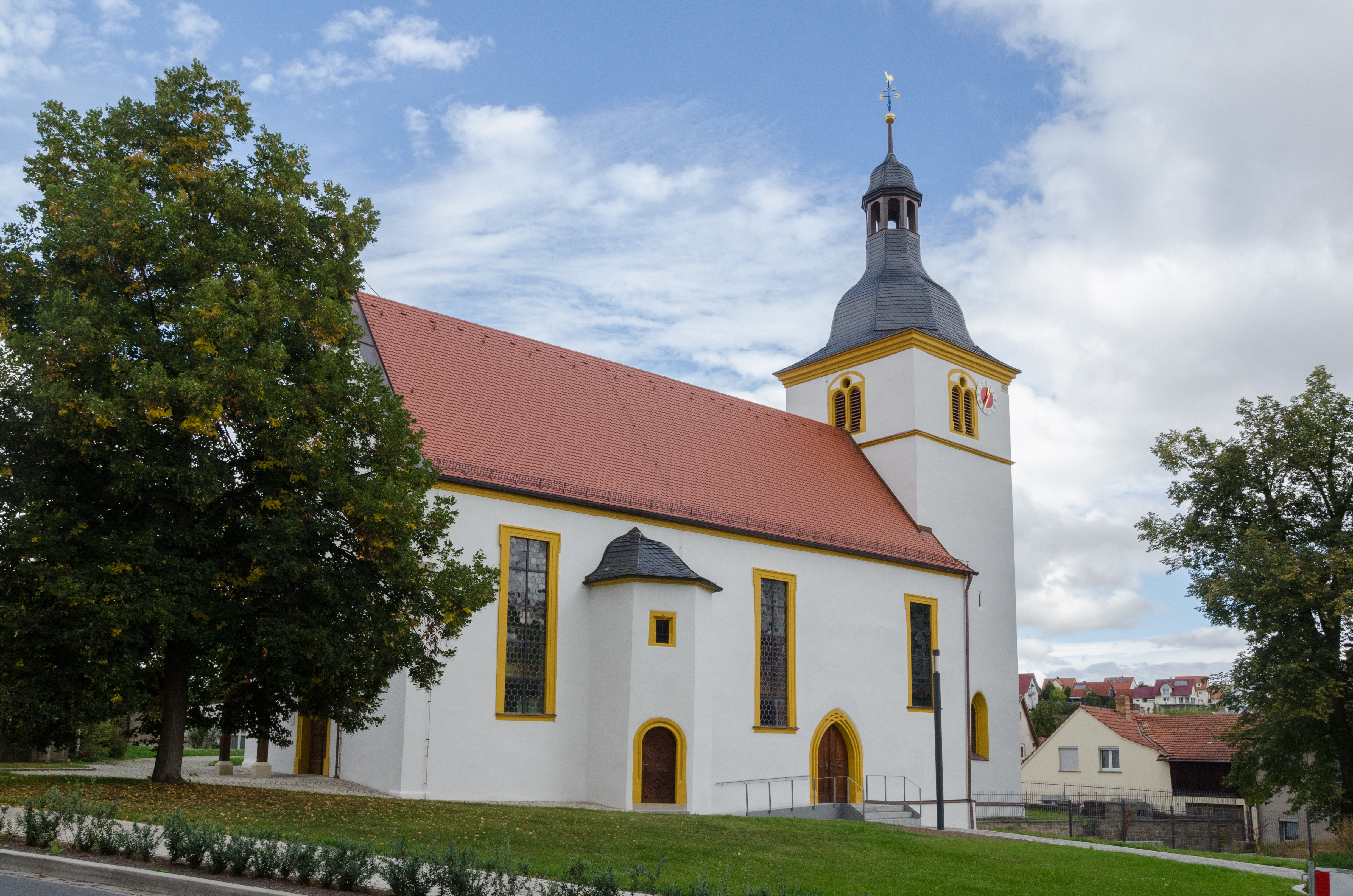 Maßbach, St. Barholomäus, Sep. 2013 nach der Außenrnovierung